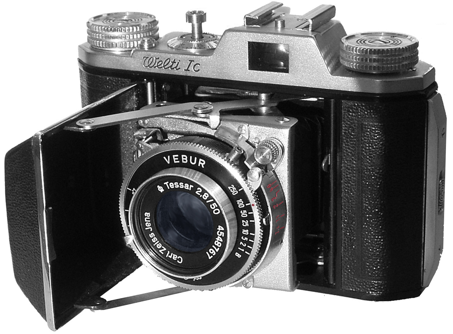 Tragisch: Das 1939 schon 25 Jahre alte Welta-Werk in Freital hatte den 2. Weltkrieg zunächst gut überstanden. 1945 wurde es zunächst von den Sowjets demontiert, das wieder aufgebaute Werk aber im gleichen Jahr enteignet. Somit waren die (VEB) Welta-Kamera-Werke Freital 1946 eine der ersten volkseigenen Betriebe Sachsens. Man nahm zuerst die Produktion der Vorkriegs-Rollfilm-Weltax und der Kleinbild-Welti wieder auf. Die Welti I bekam 1953 eine neue Oberkappe und hieß dann „Welti Ic“. Meine hat ein Tessar und einen Vebur-Verschluss und macht einen sehr sauber verarbeiteten Eindruck. Man kann auch durchaus Ähnlichkeiten mit einer Kodak Retina feststellen. Folgende bemerkenswerte Eigenheiten möchte ich noch hervorheben: Beim Zuklappen stellt sich das Objektiv auf „unendlich“ zurück. Nach jeder Aufnahme muss man den Auslöseknopf für Transportsperre niederdrücken, sonst kann man den Film nicht weiter transportieren: ein sicherer Schutz vor Doppelbelichtungen! Am Sucher befindet sich ein verstellbarer Ring für den Parallaxenausgleich bei Nahaufnahmen. Auf der Rückseite ist eine Tiefenschärfetafel befestigt. Alles in allem eine handliche Klappkamera für 24x36 mm, die ich gerne in die Hand nehme.